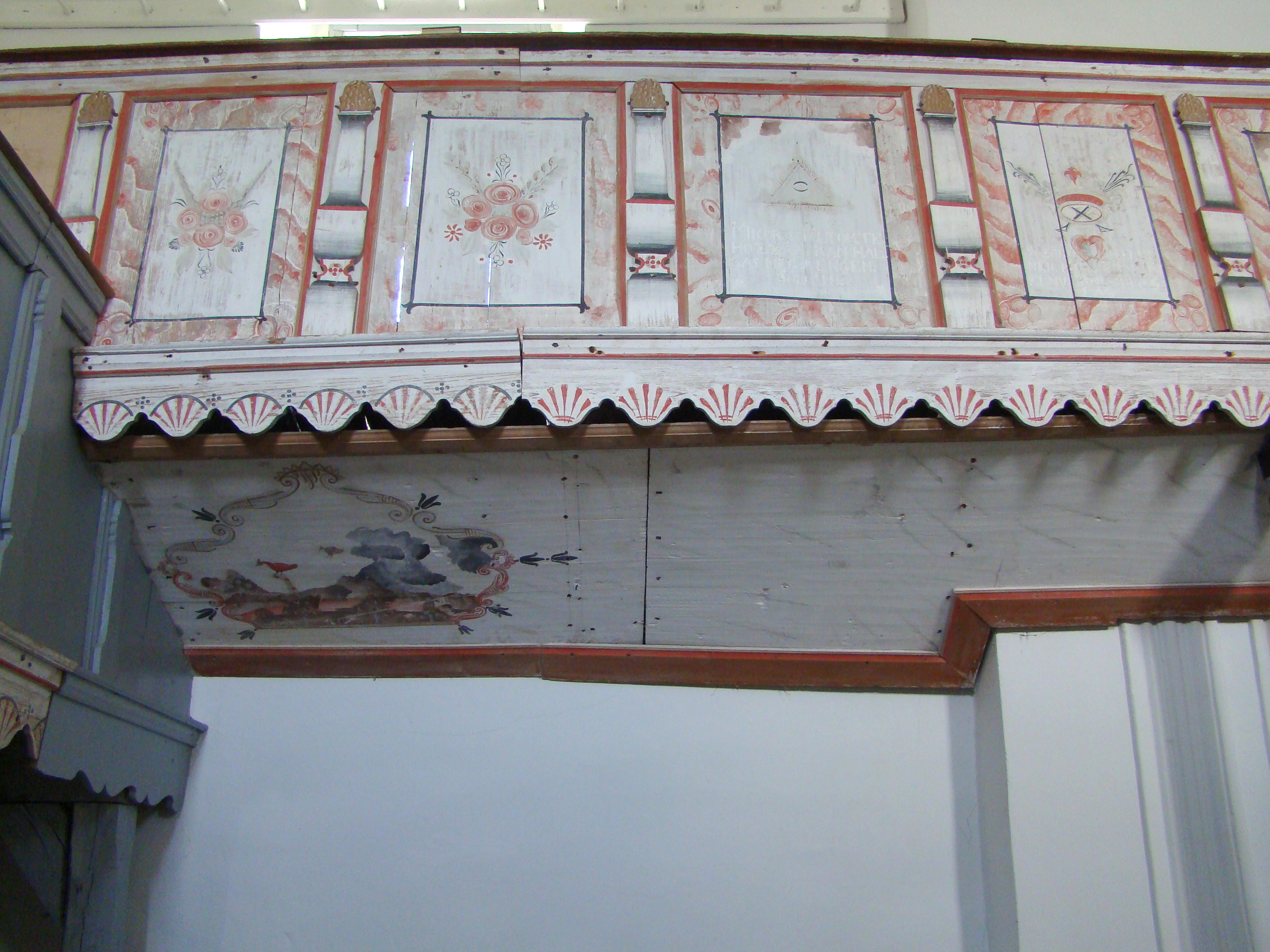 Biserica evanghelică, sat Jimbor; comuna Homorod